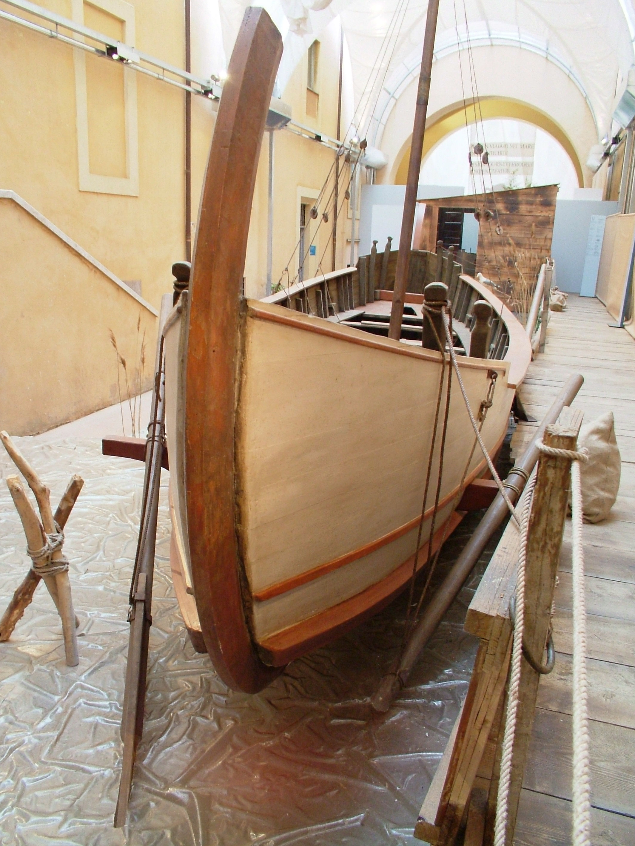 Poppa, remi timone : Alkedo (gabbiano) ricostruzione della barca trovata quasi intatta a Pisa/San Rossore - Italia.